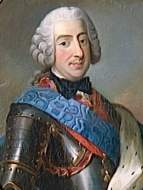 François-Marie d'Este, duc de Modene en 1737 (1698-1780), portant l'ordre de la Toison d'Or